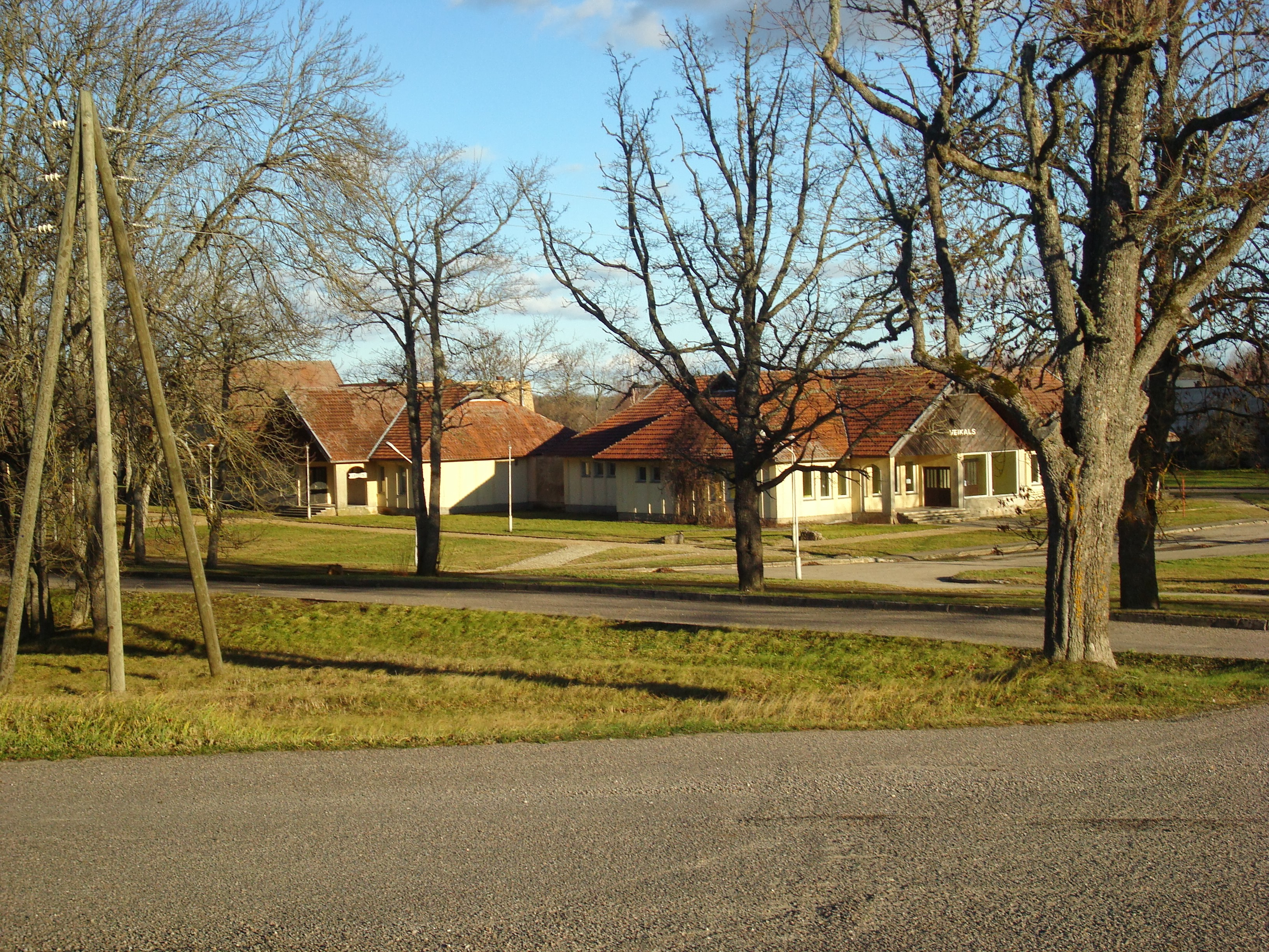 Lodes muižas bijušā kompleksa vietā